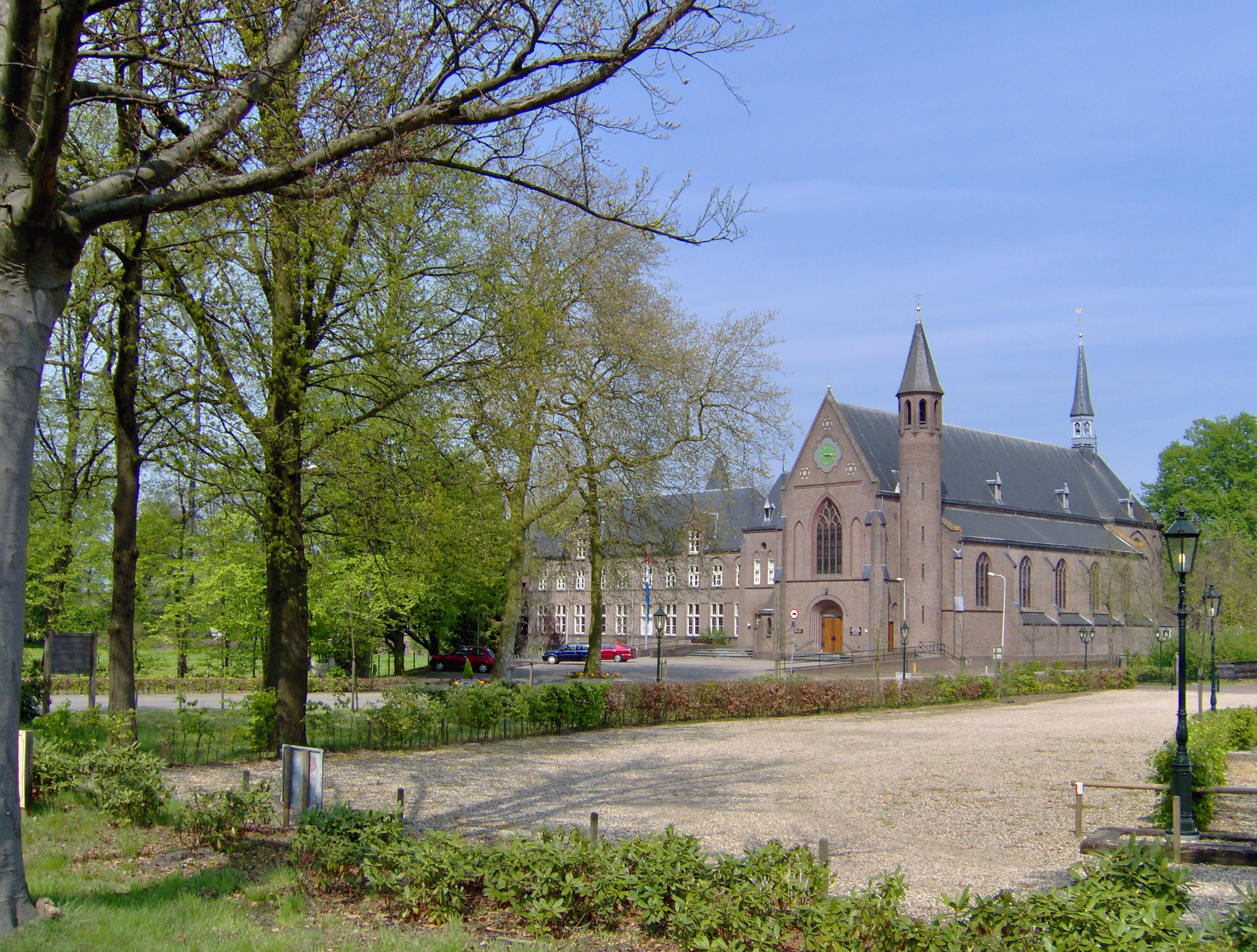 De Parochiekerk van Onze Lieve Vrouw Onbevlekt Ontvangen with next to it the Karmelietenklooster, the Carmelites monastery, in Zenderen, municipality of Borne in the province of Overijssel, the Netherlands.